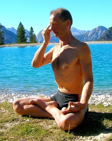 Instructor de Kundalini yoga practicando Pranayama